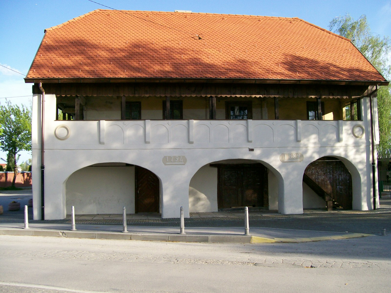 Stari župni dvor, Sveta Nedelja